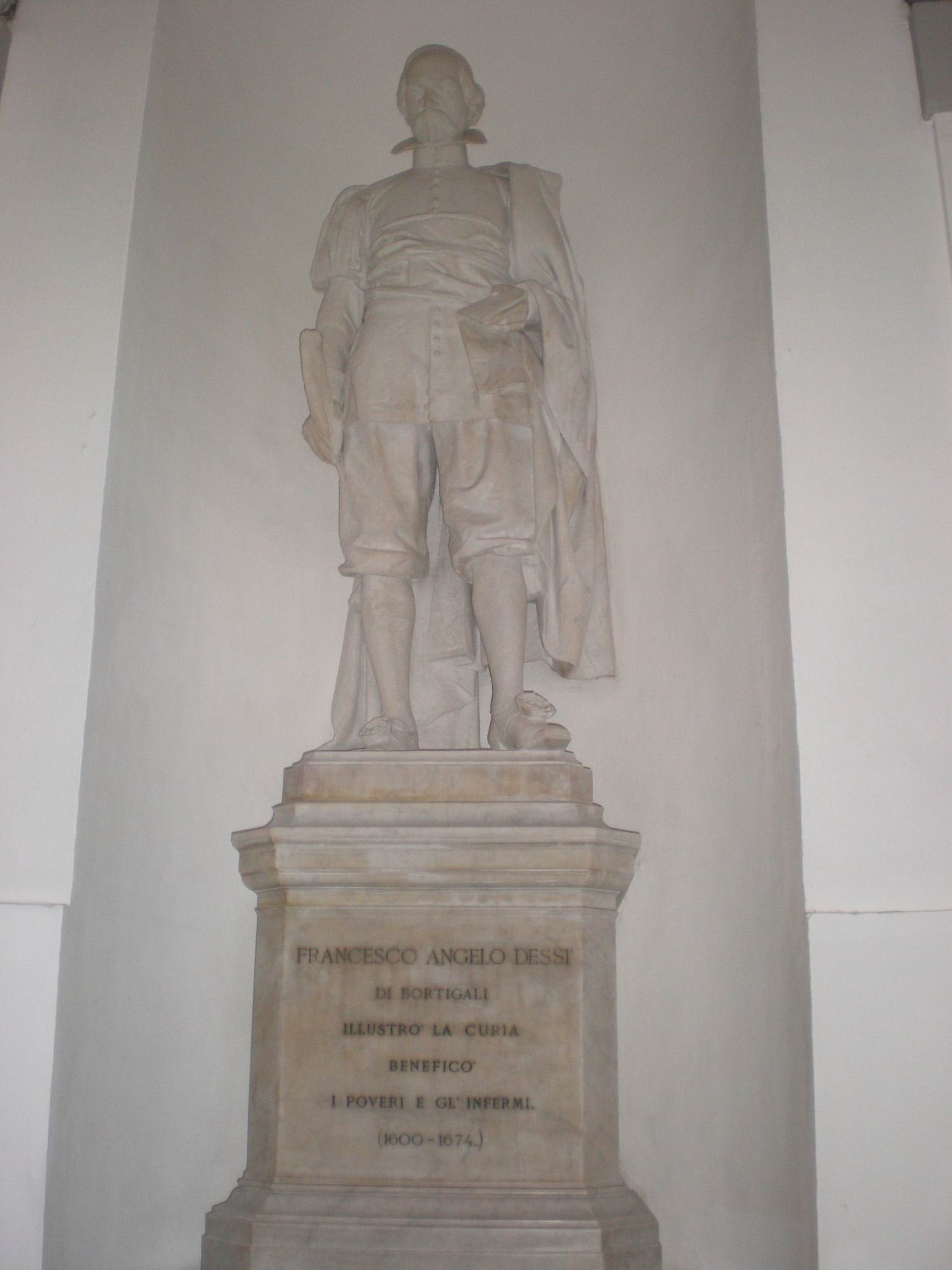 Ospedale Civile - Cagliari: Statua in onore del benefattore Francesco Angelo Dessì